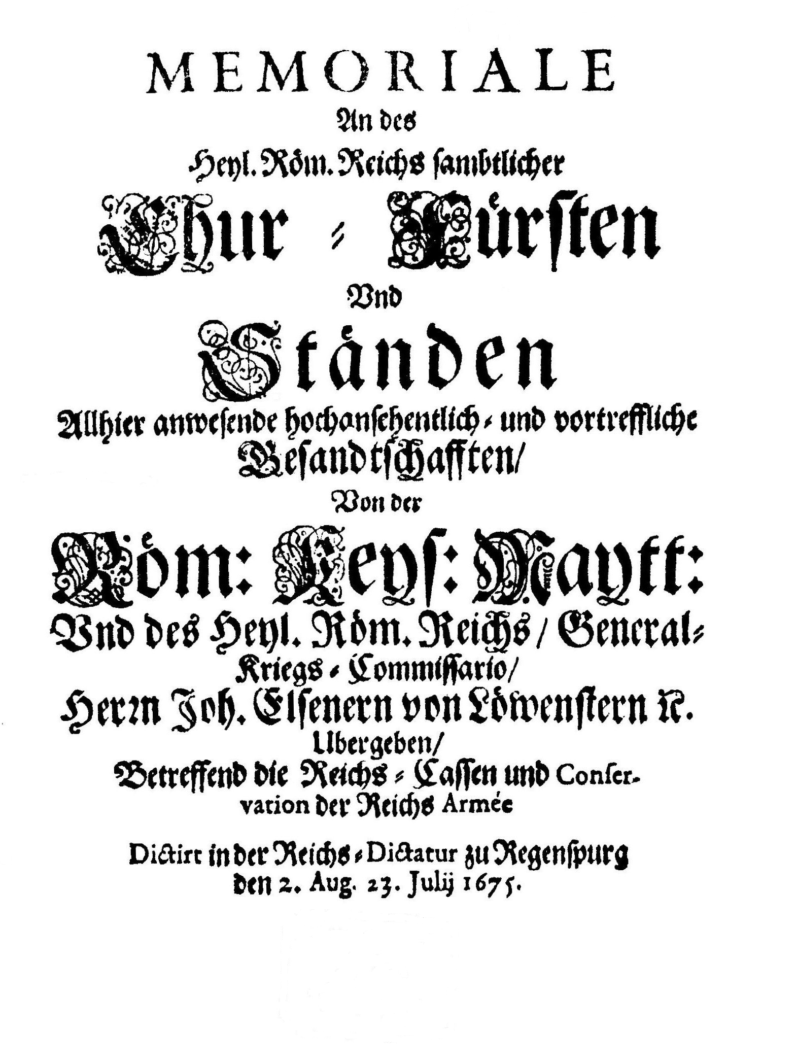 Titelblatt der „Memoriale An des Heyl. Röm. Reichs sambtlicher Chur-Fürsten Und Ständen Allhier anwesende hochansehentlich- und vortreffliche Gesandtschafften“